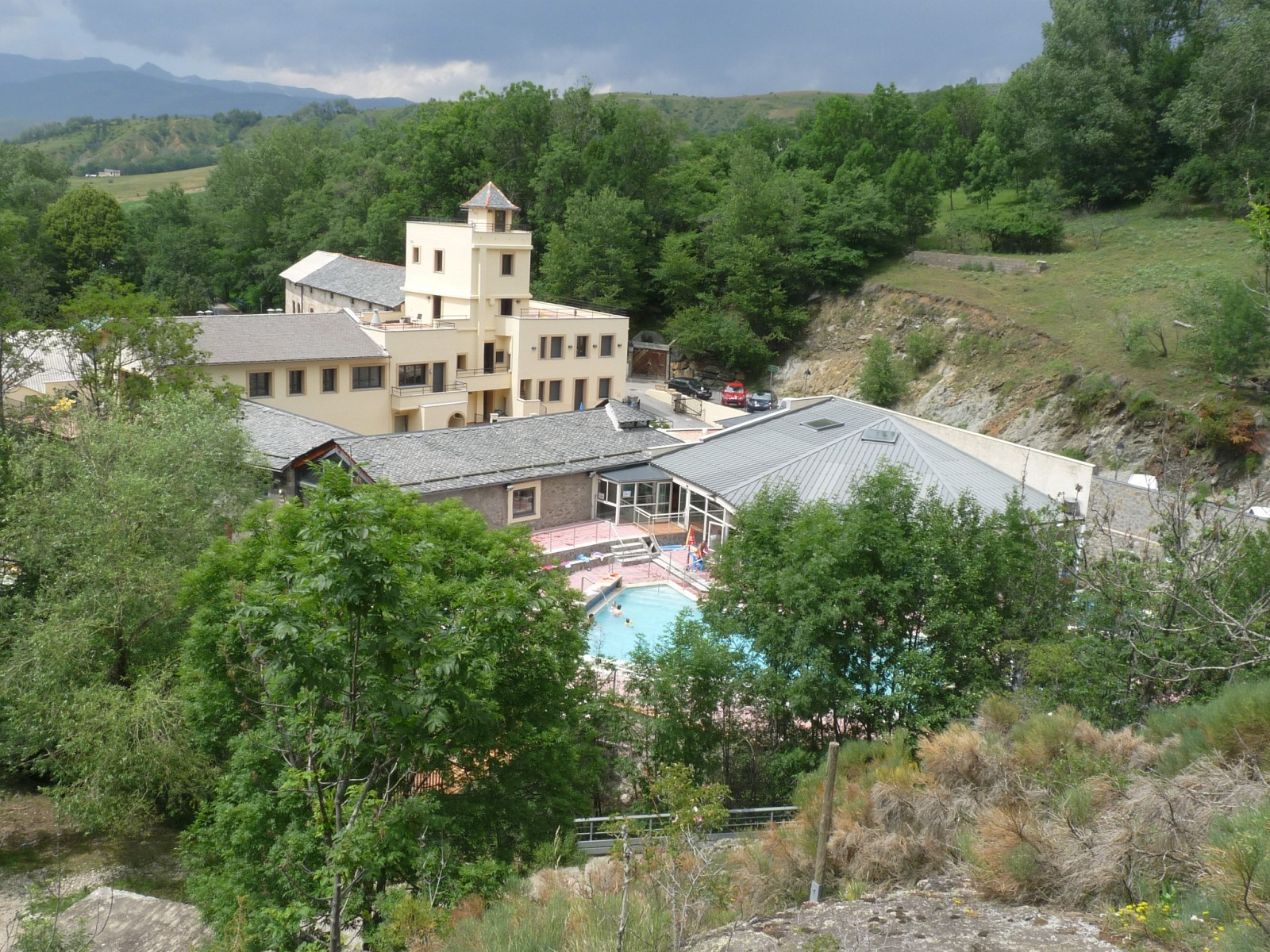 Bains de Llo, Pyrénées-Orientales, France